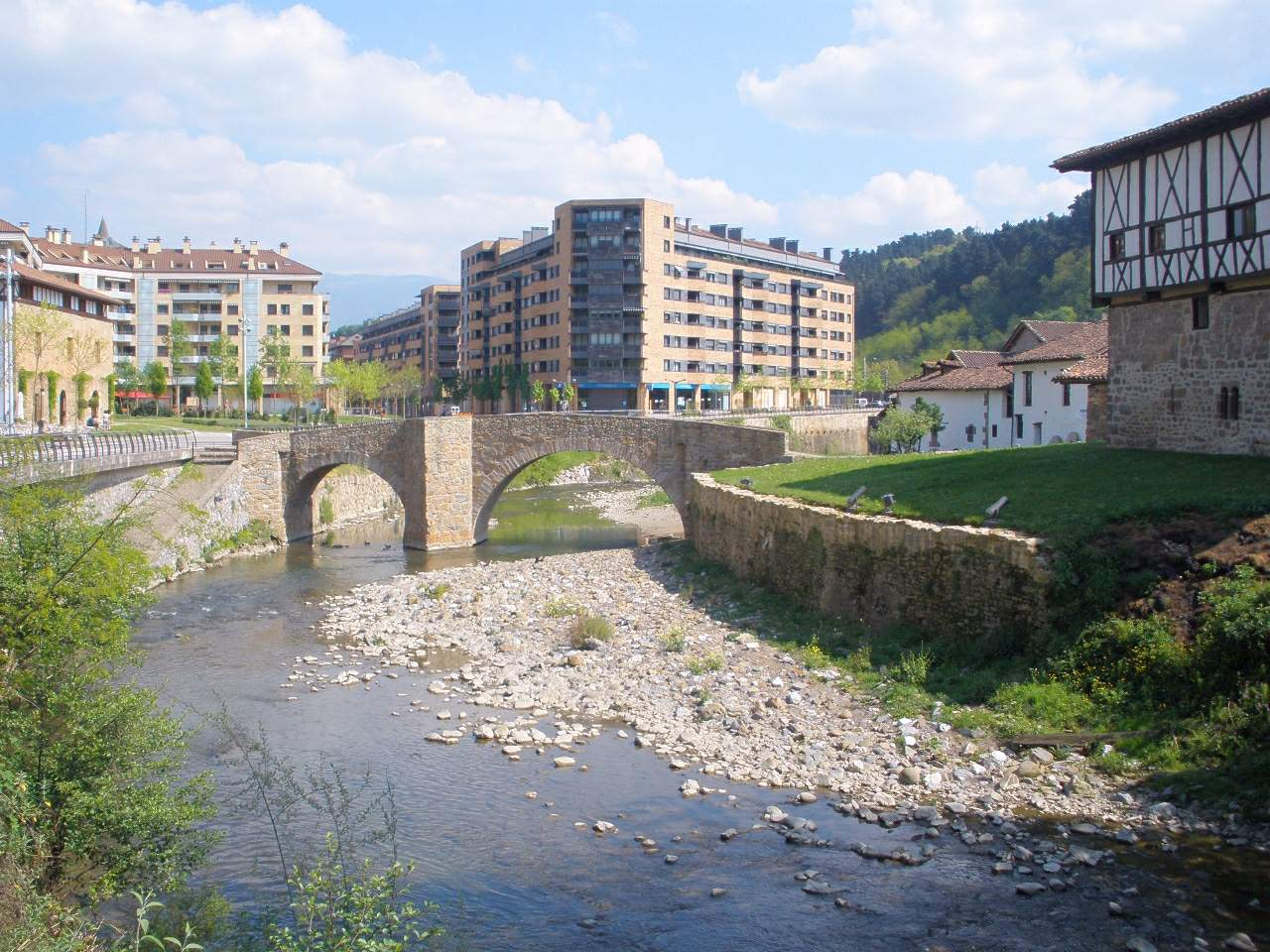 Beasain